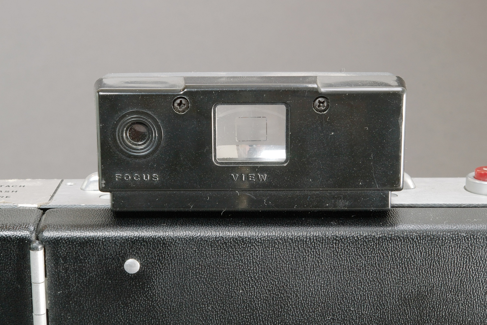 Polaroid Land Camera Automatic 100, Messsucher. Links der Einblick für die Entfernungsmessung, Mitte der normale Leuchtrahmensucher